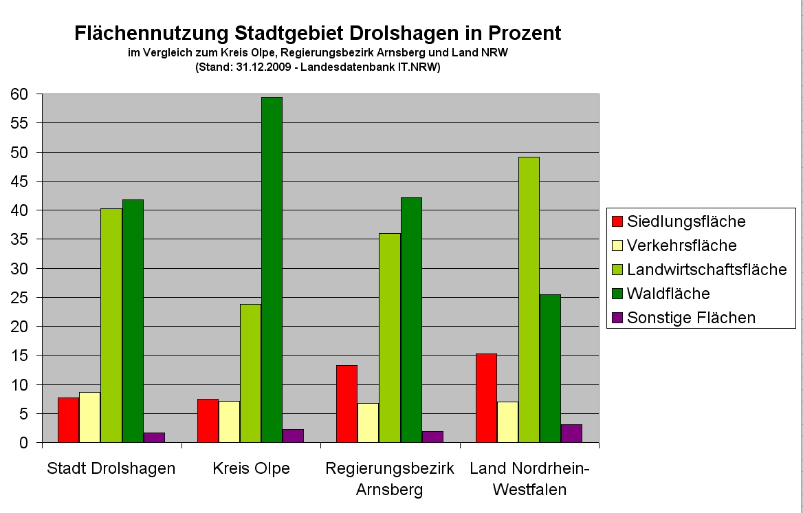 Fächennutzung Stadtgebiet Drolshagen im Vergleich zum Kreis Olpe, Regierungsbezirk Arnsberg und Land NRW. Datenherkunft: Kommunalprofil der Stadt Drolshagen (IT.NRW, Landesdatenbank, Stand: 26. November 2010